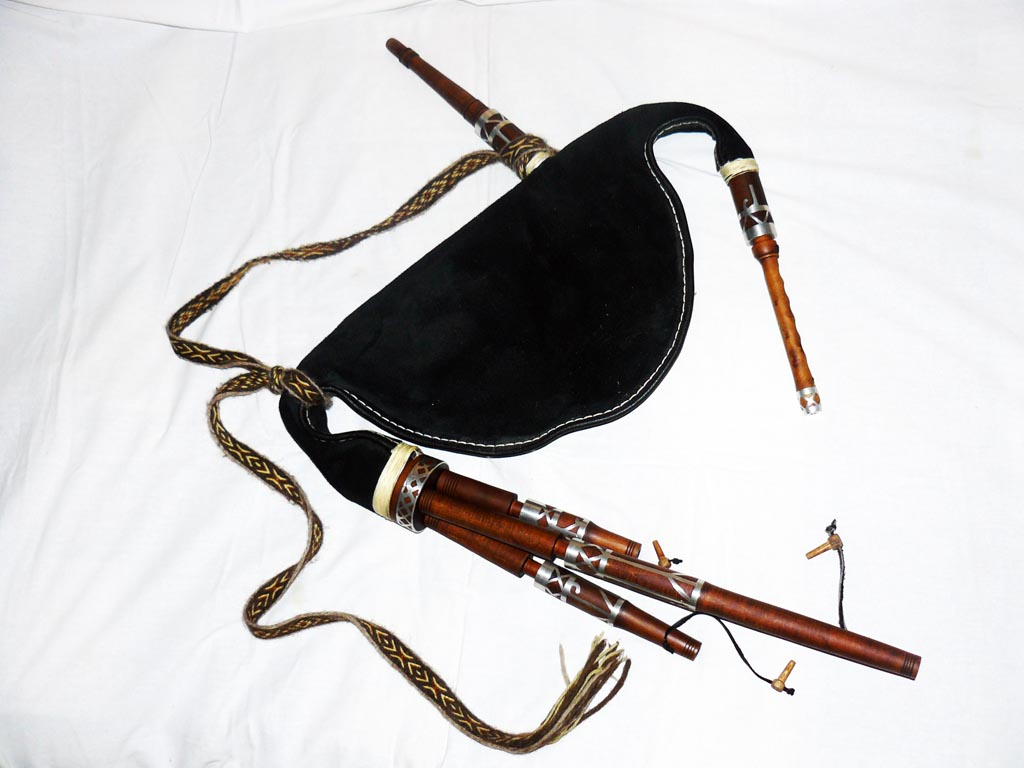 Беларуская (тарашкевіца): Дуда ліцьвінская Мацянка (Мыцьянка)